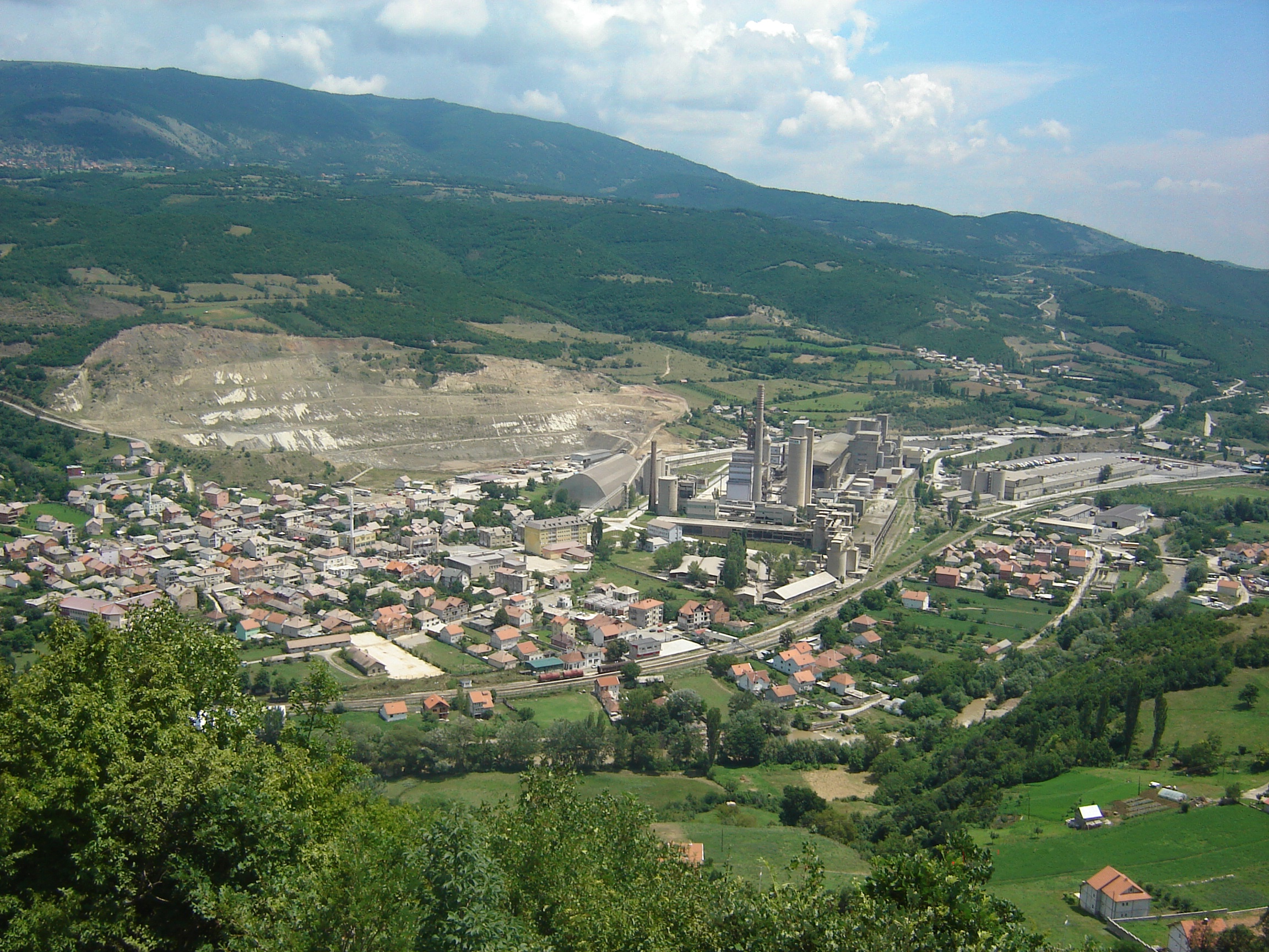 Komuna Hani i Elezit